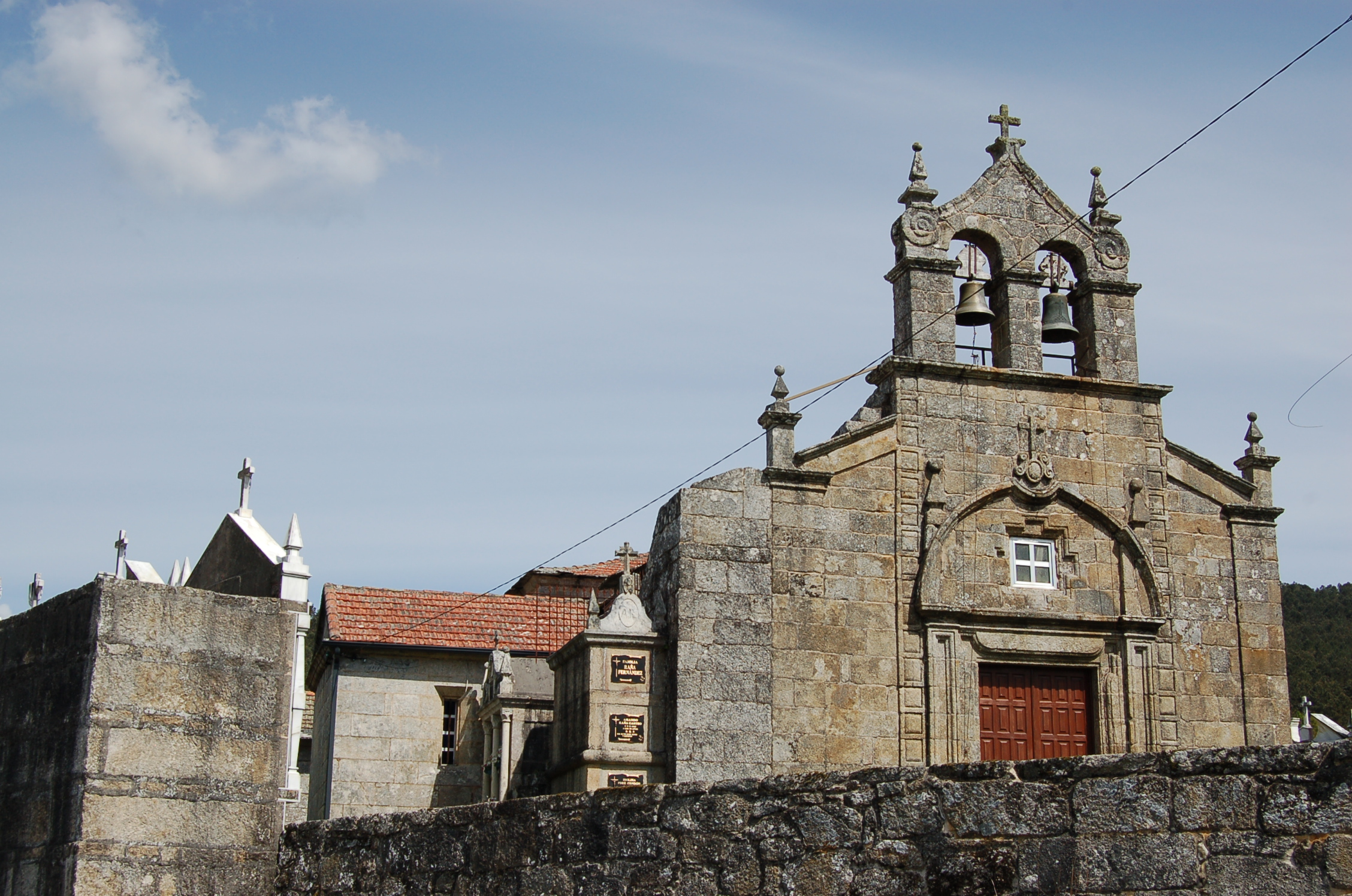 Igrexa parroquial de Santa Baia de Barroso, Avión